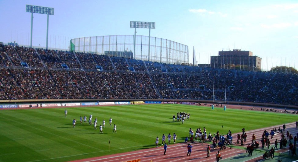 ラグビー早明戦